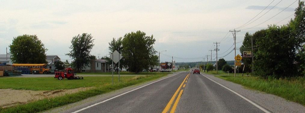 Photo de la route 139, à Acton Vale, Québec, Canada.